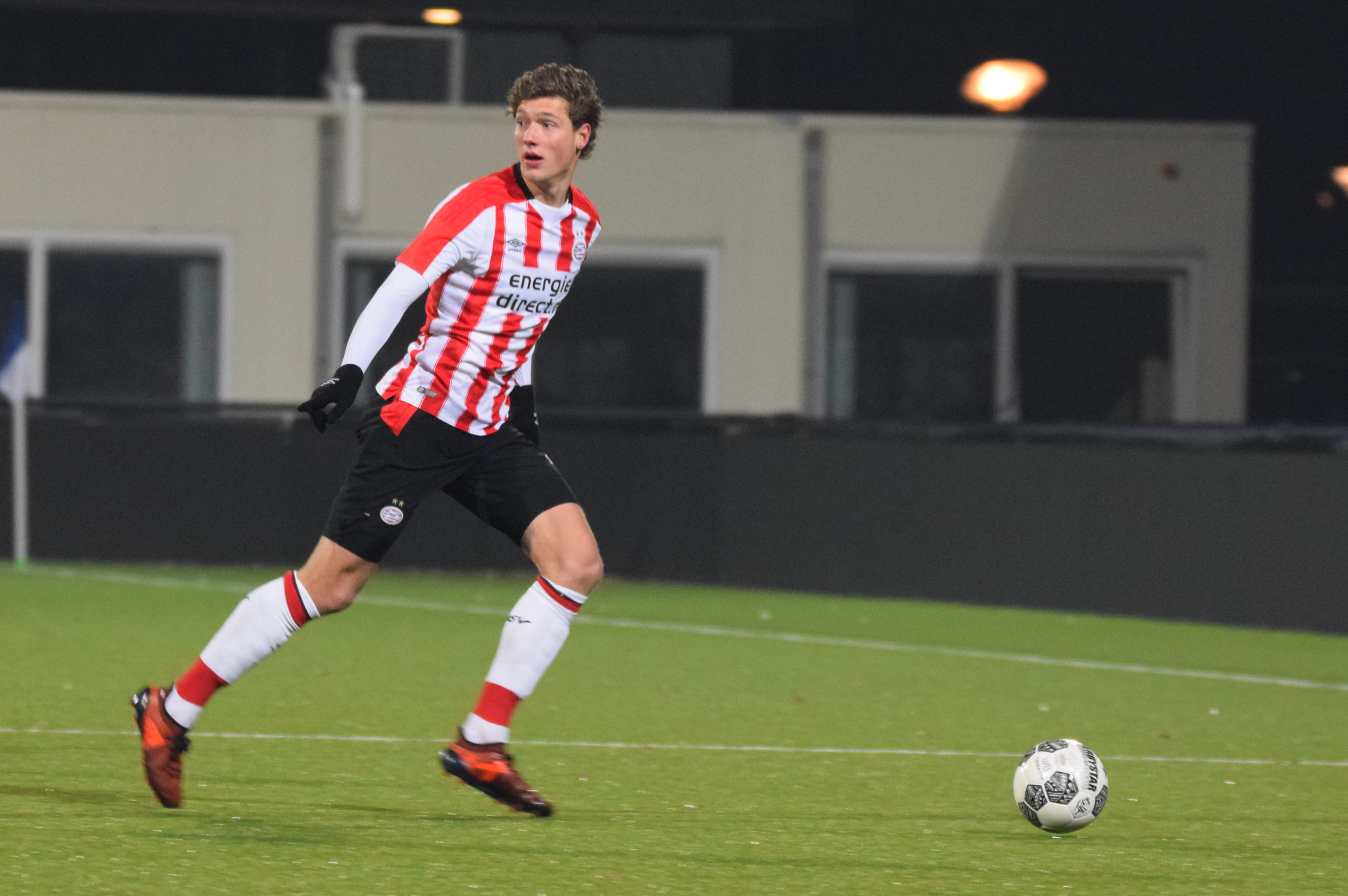 Sam Lammers